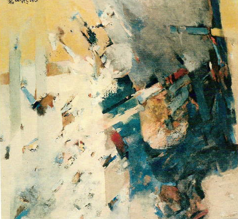 "Między Ciszą", olej na płótnie 100x100